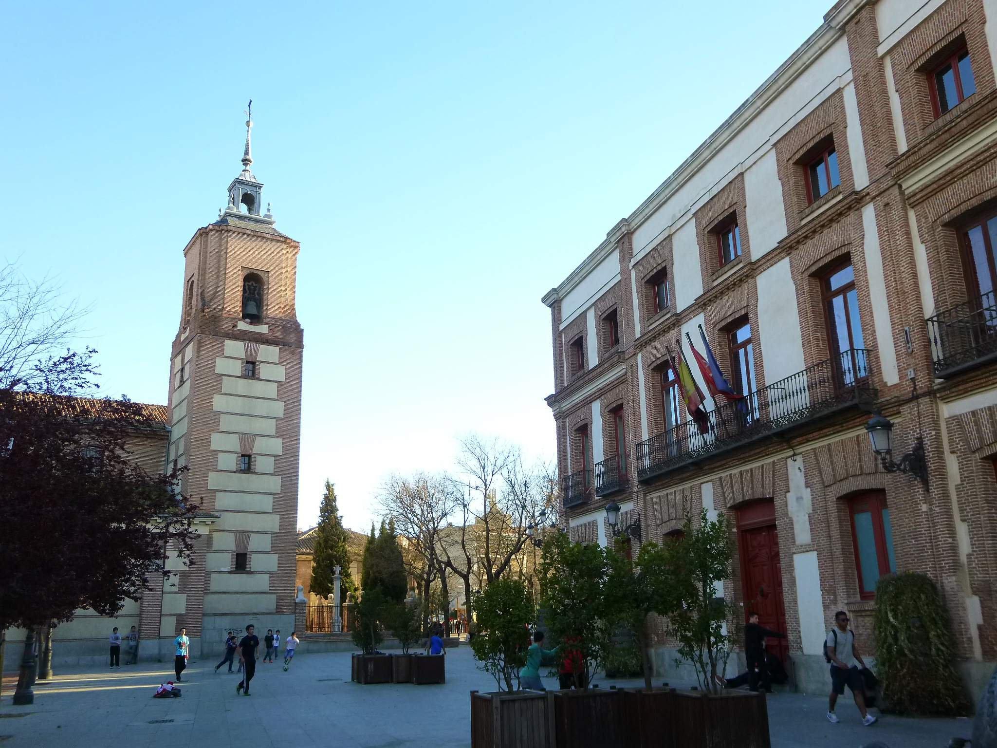 Barrio de Puerta Bonita, Distrito de Carabanchel (Madrid)